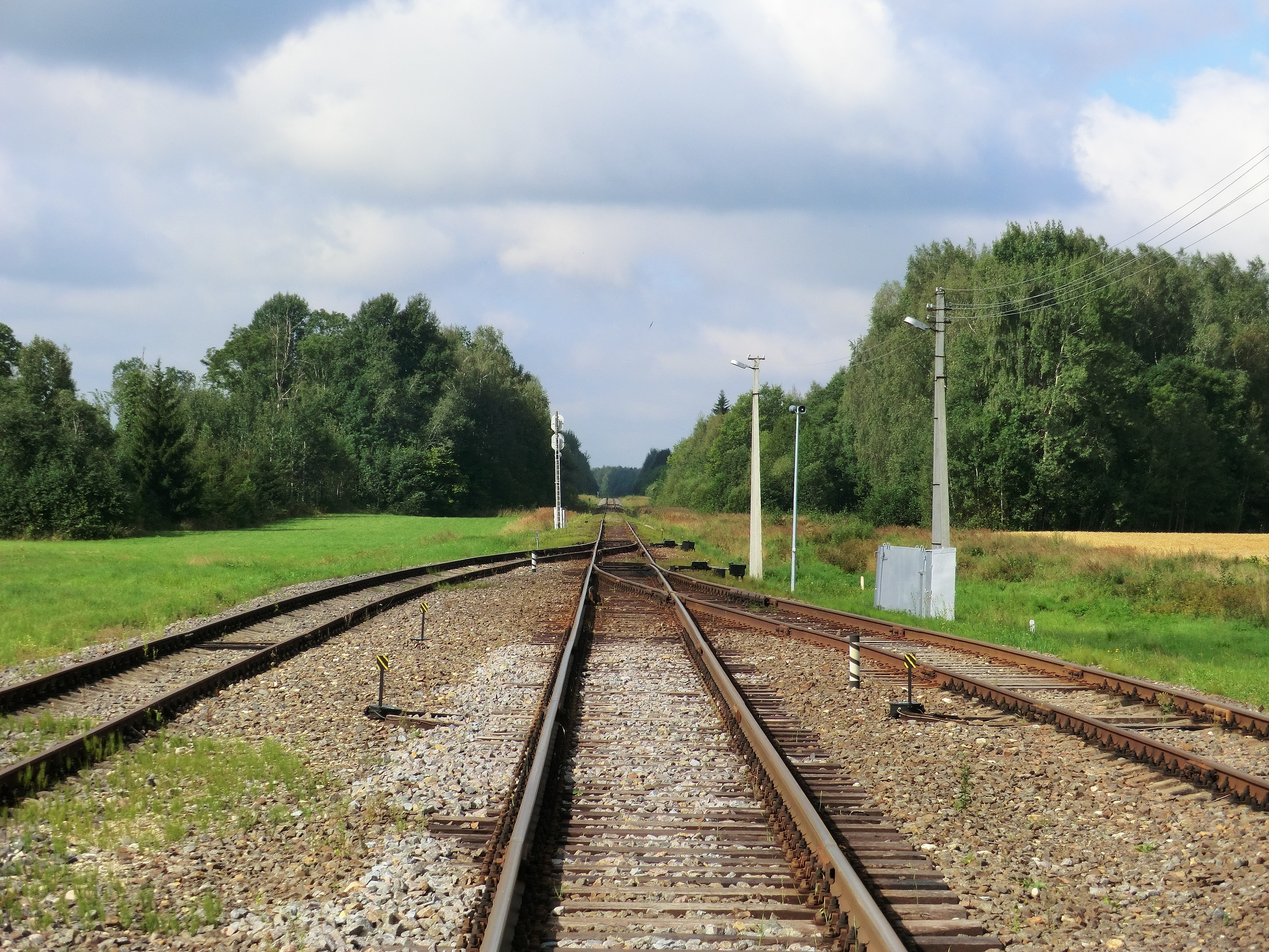 нечётная горловина ст. Скапишкис